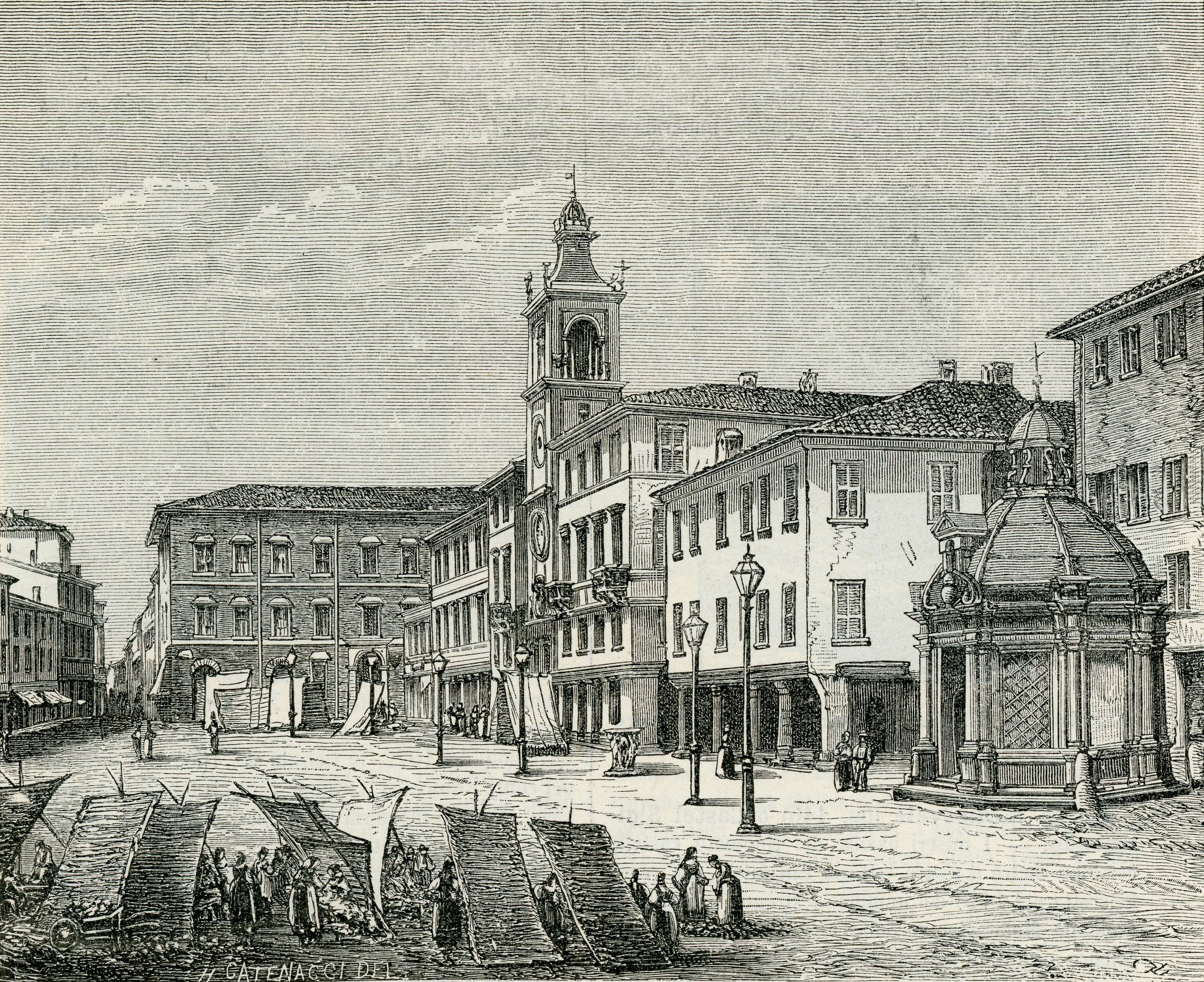 Rimini: Piazza Giulio Cesare e Tempietto di Sant’Antonio, incisione di Hercule Catenacci.